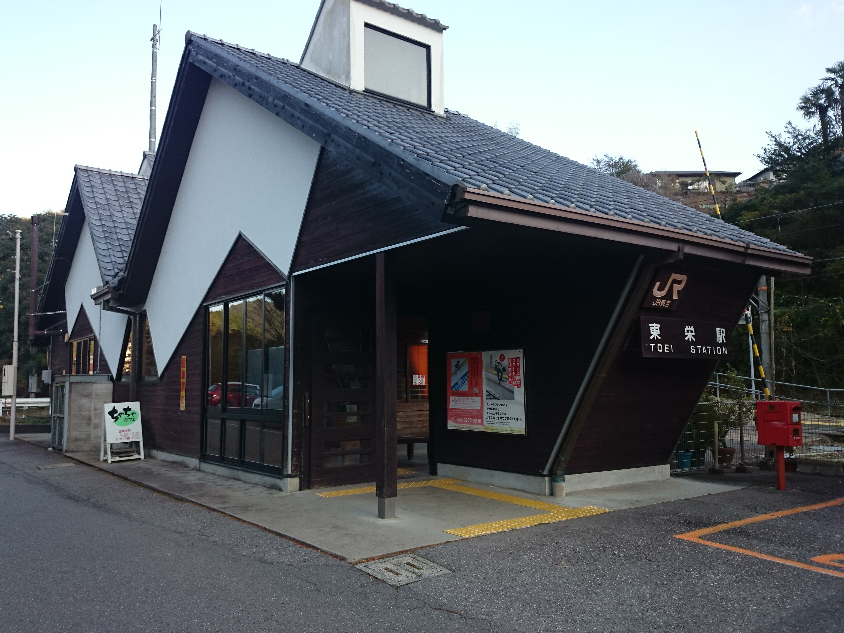 飯田線東栄駅 北口